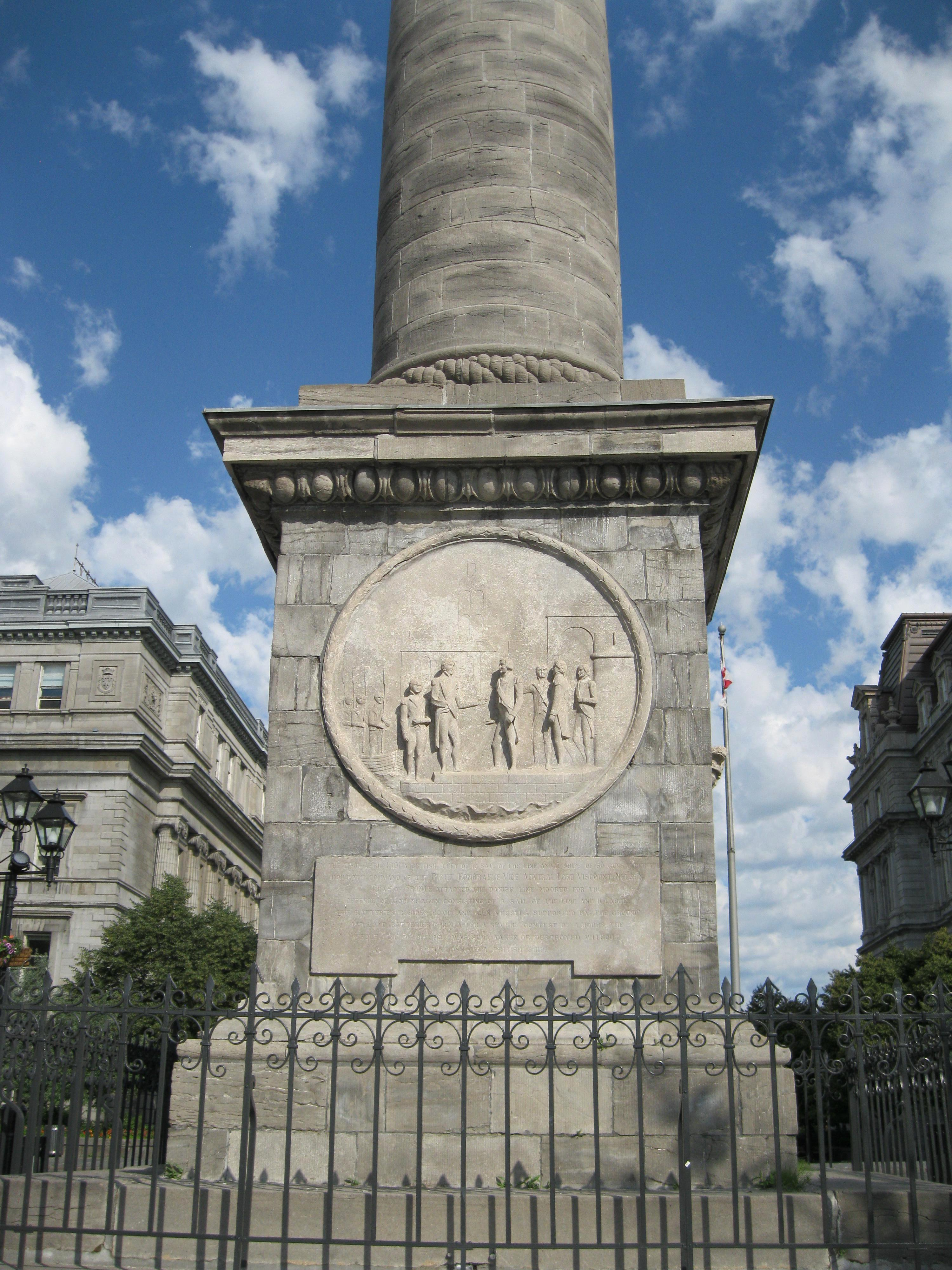 Colonne Nelson, place Jacques-Cartier, Montréal